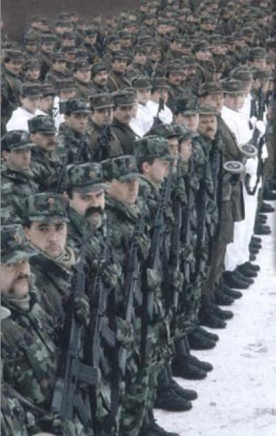 Postroj 30. razvojne skupine (brigade MORiS) Teritorialne obrambe Republike Slovenij v Kočevski reki. V postroju so bili večinoma pripadniki rezervne sestave zaščitne brigade TO.